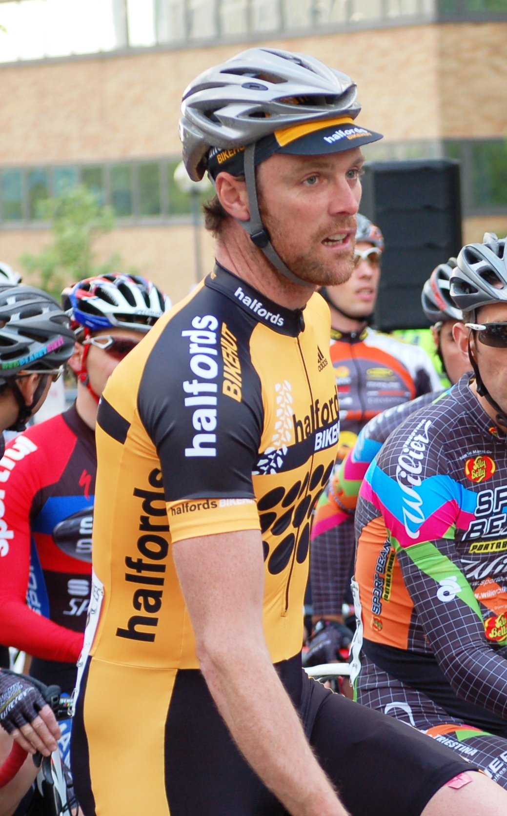 Rob Hayles